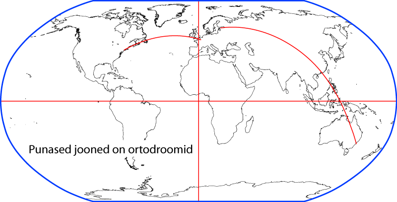 Ortodroomid